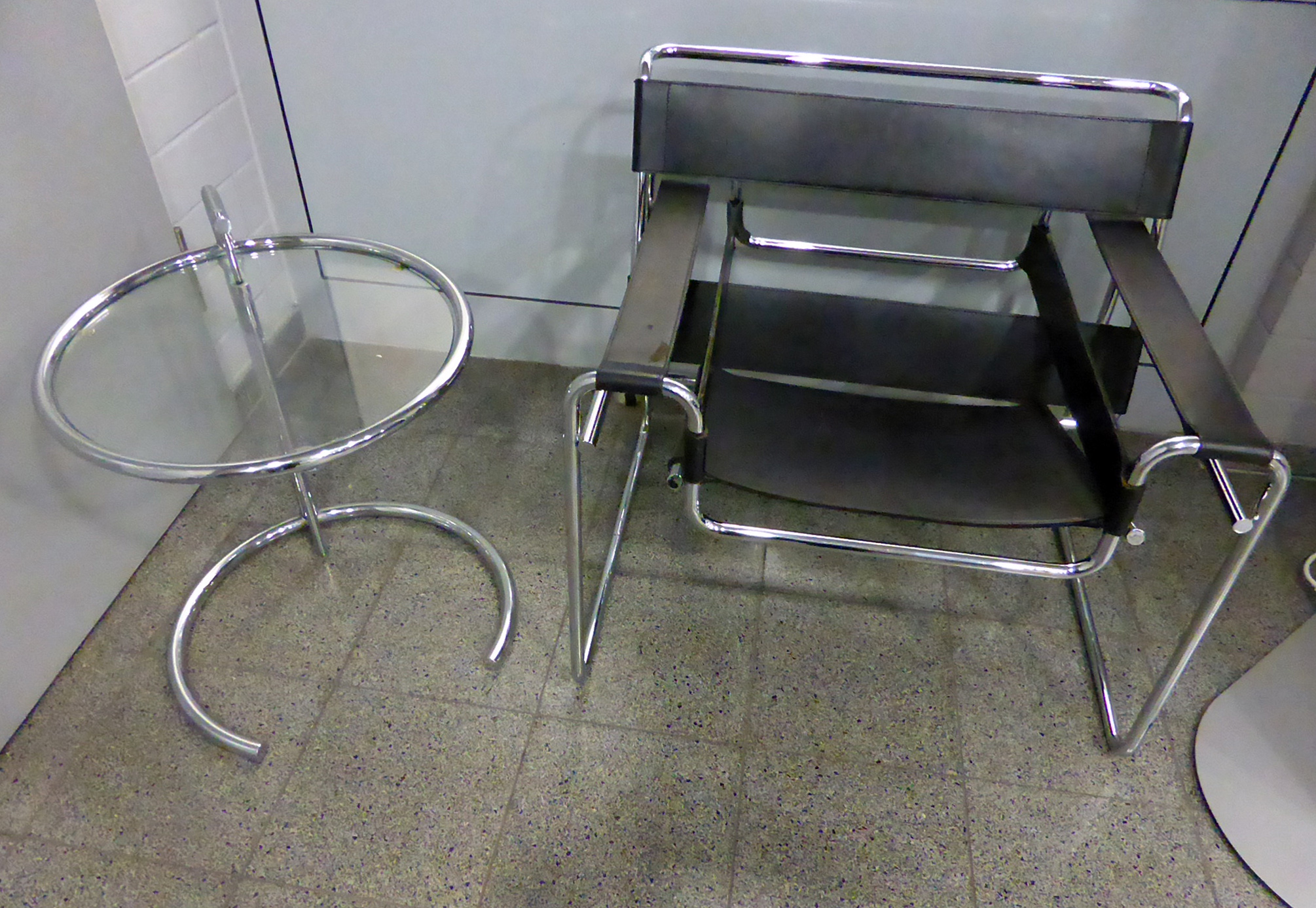 Marcel Breuer - Wassily Chair ; Eileen Gray - Adjustable table E-1027.